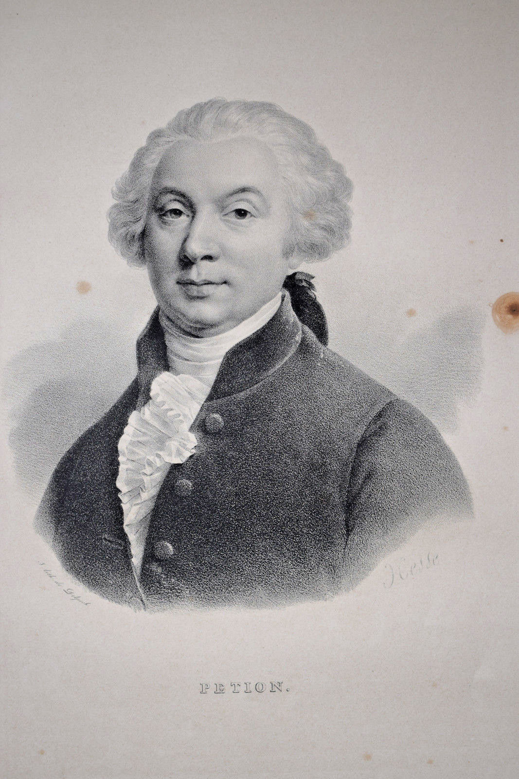 Jérôme Pétion. Lithographie de François-Séraphin Delpech d'après un portrait par Henri-Joseph Hesse, 1832.